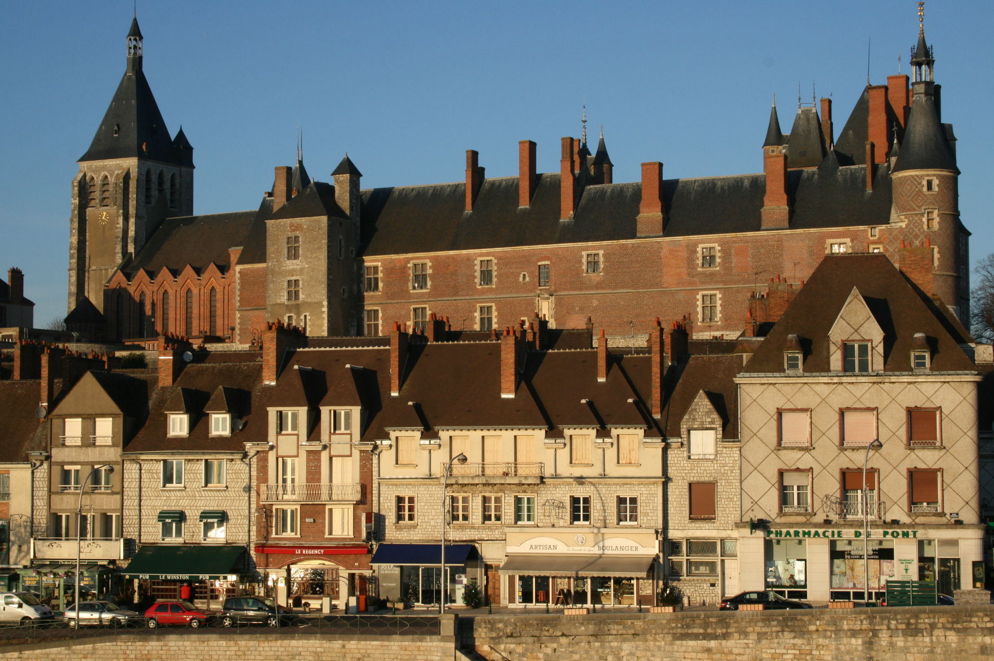 Château de Gien (Loiret - France) - Vue à partir du lit de la Loire.